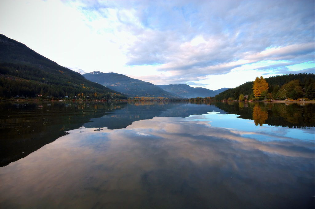 Alta Lake, BC, Canada.